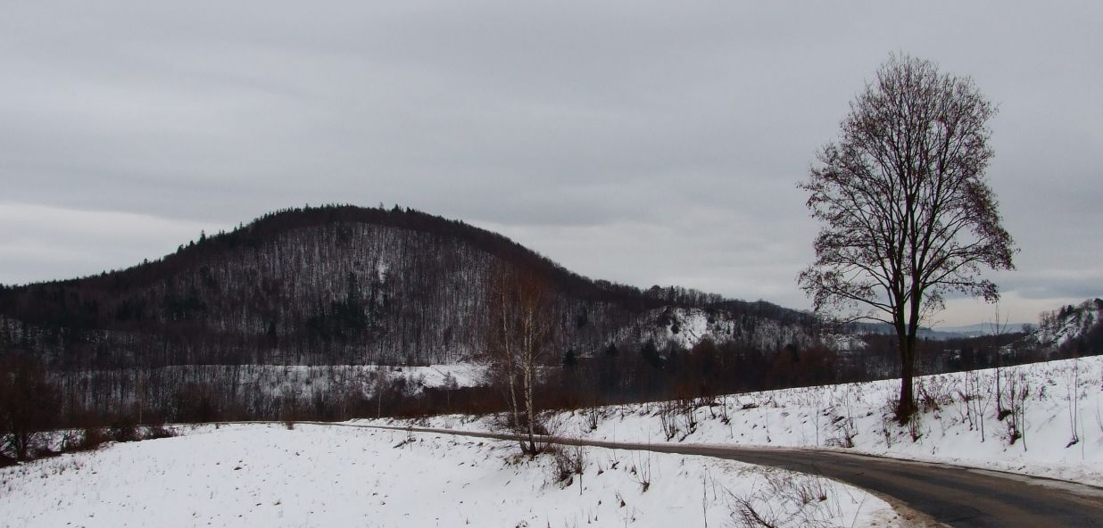 Czyżyk. Widok z drogi Maciejowiec - Pilchowice.